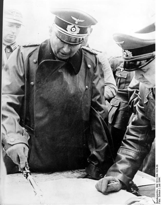 Generalfeldmarschall von Kluge, der neu ernannte Oberbefehlshaber West, befand sich in den letzten Tagen auf einer Besichtigungsfahrt an der Kanalküste. Er besuchte die dort eingesetzten Divisionen und informiert sich über den Stand der Verteidigungs- und Abwehrmaßnahmen im Falle einer erneuten Landung des Feindes. Am Kartentisch unterrichtet der Generalfeldmarschall den Kommandierenden General eines Armee-Korps, General der Panzertruppen Kuntzen. PK-Aufn.-Kriegsber.: Scheck, 21.7.1944